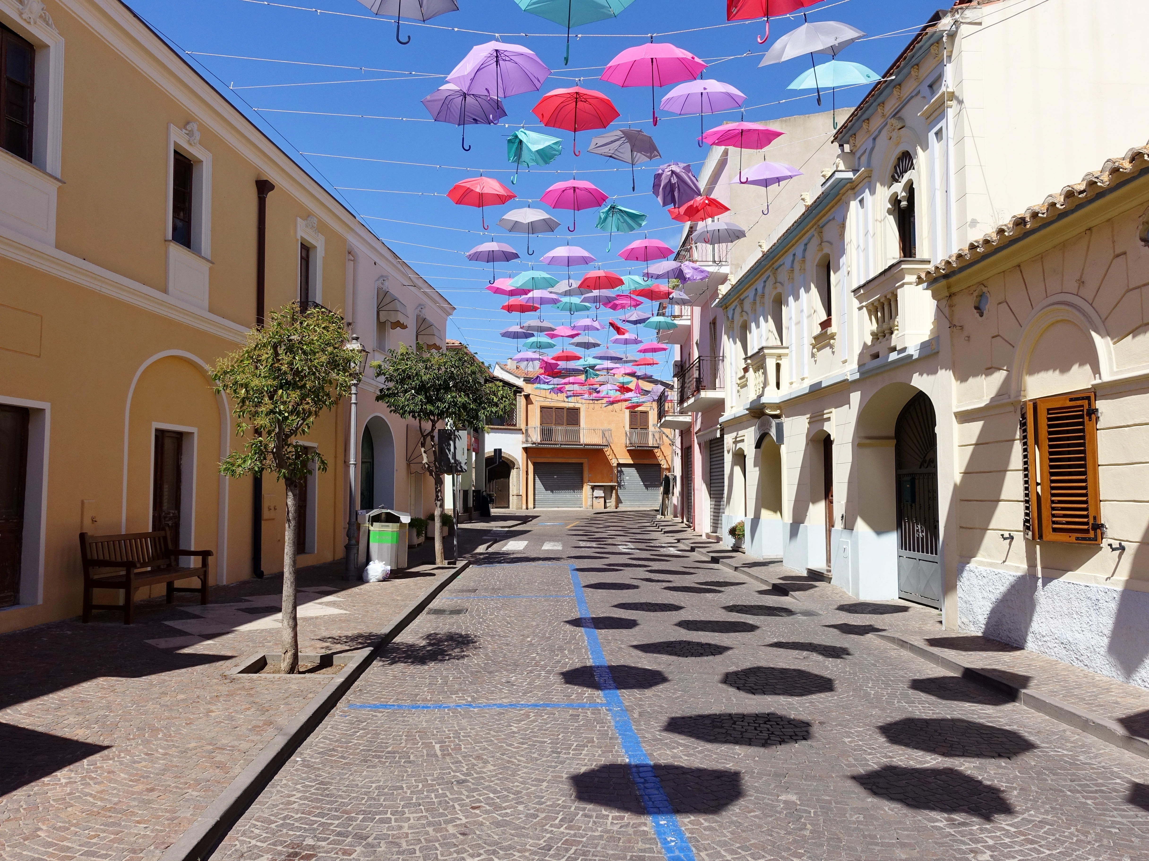 Schirme über einer Straße in Pula, Sardinien, Italien